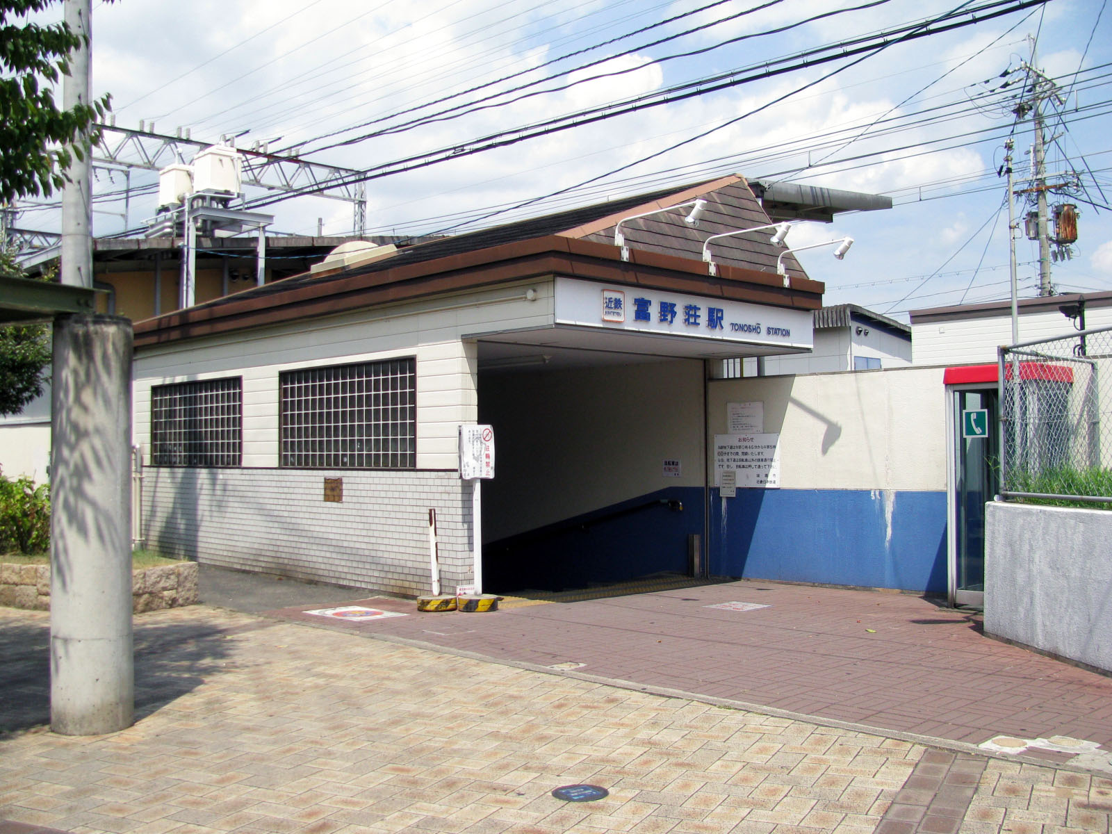 近鉄京都線富野荘駅